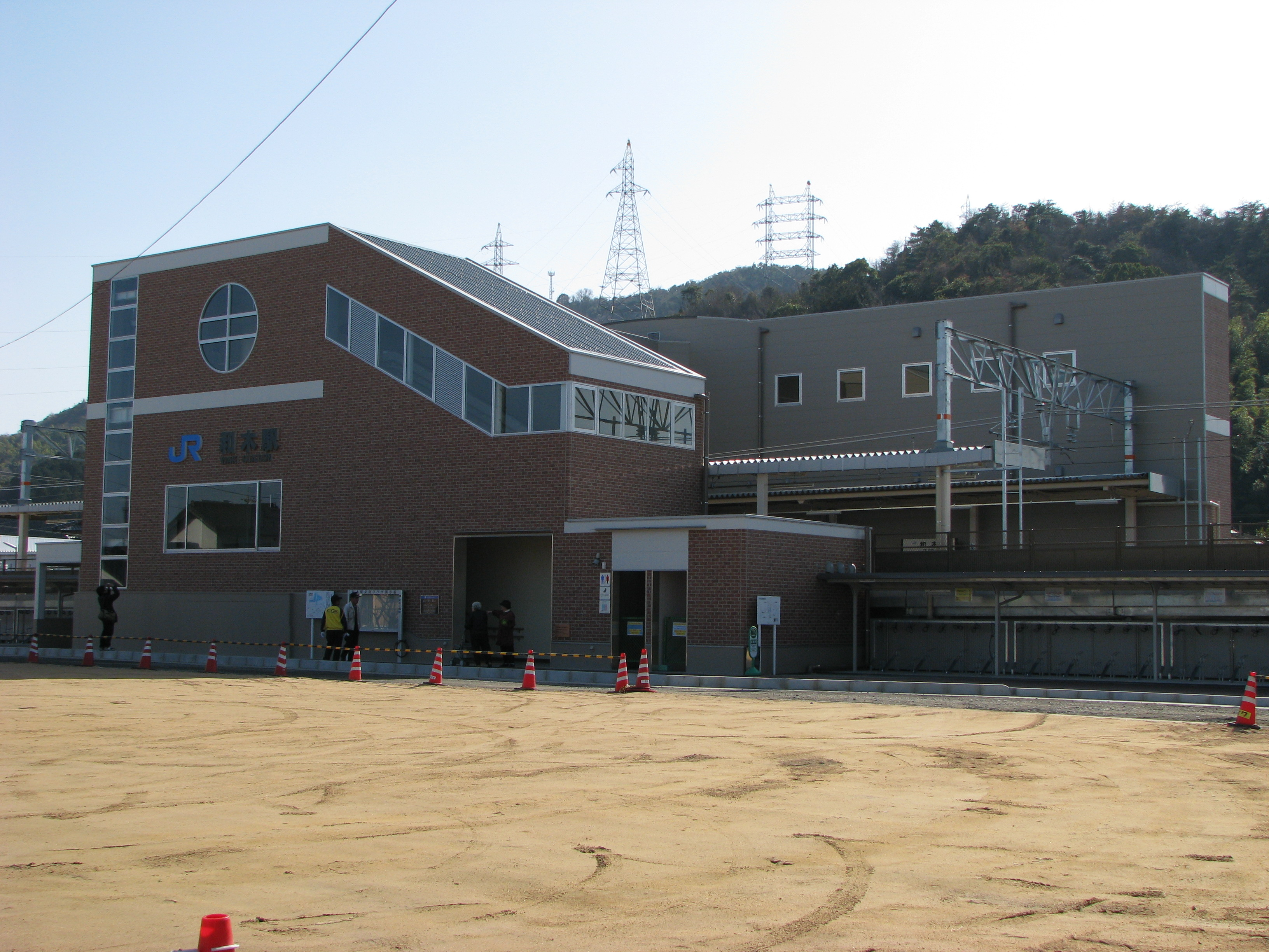 和木駅東口